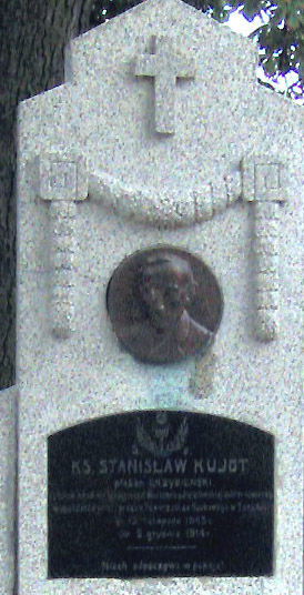 Płyta nagrobna Stanisława Kujota